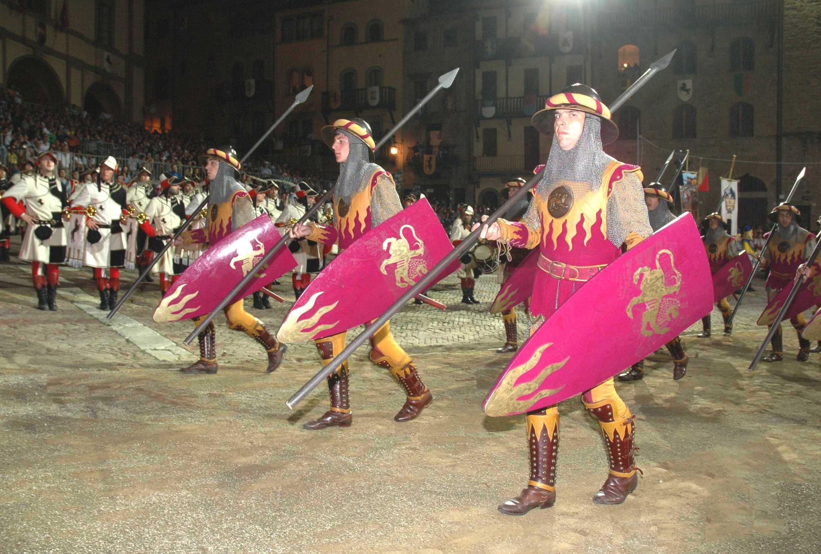 Gli armigeri del Quartiere di Porta del Foro, alla Giostra del Saracino ad Arezzo.